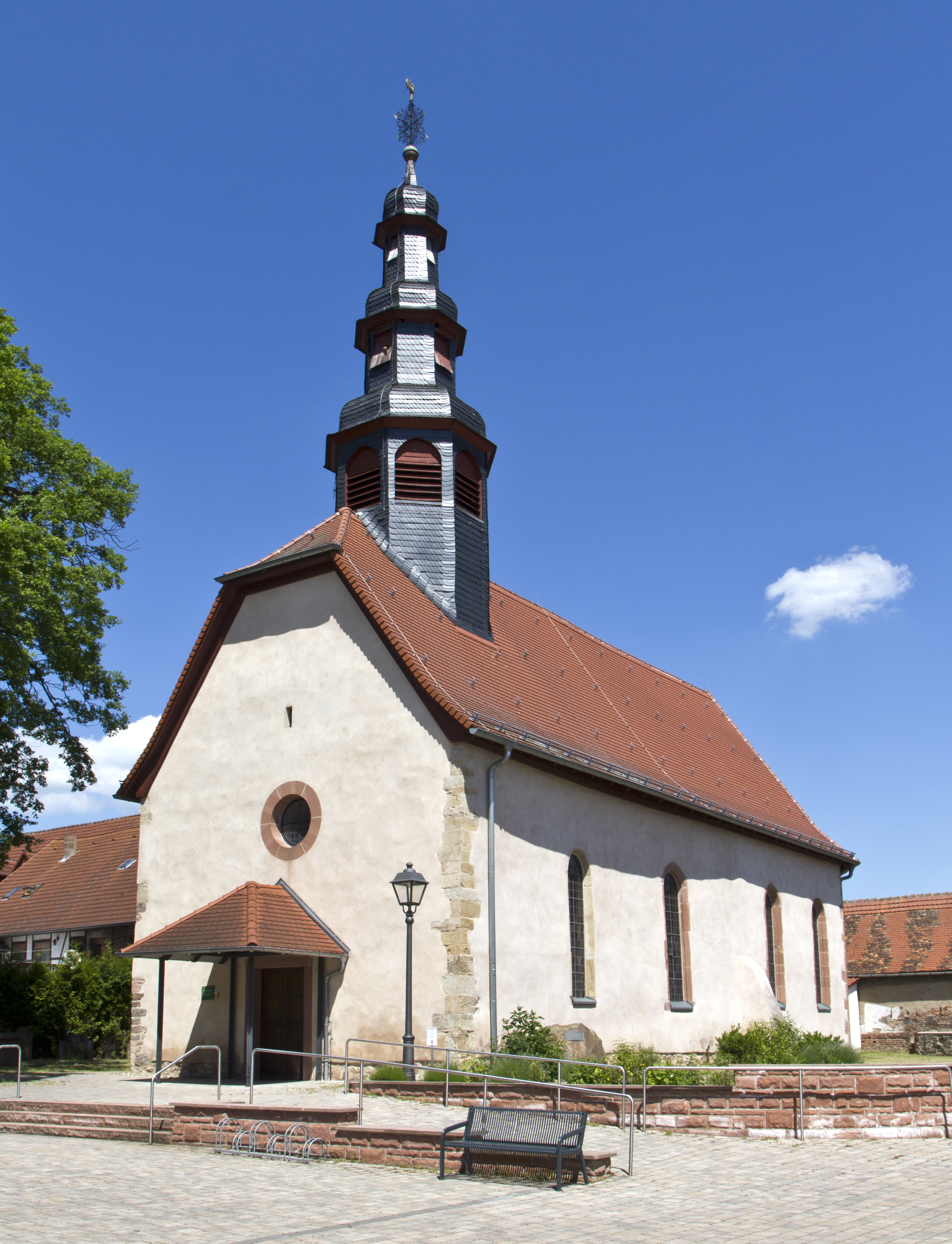 Evangelische Kirche in Nidderau, Stadtteil Eichen